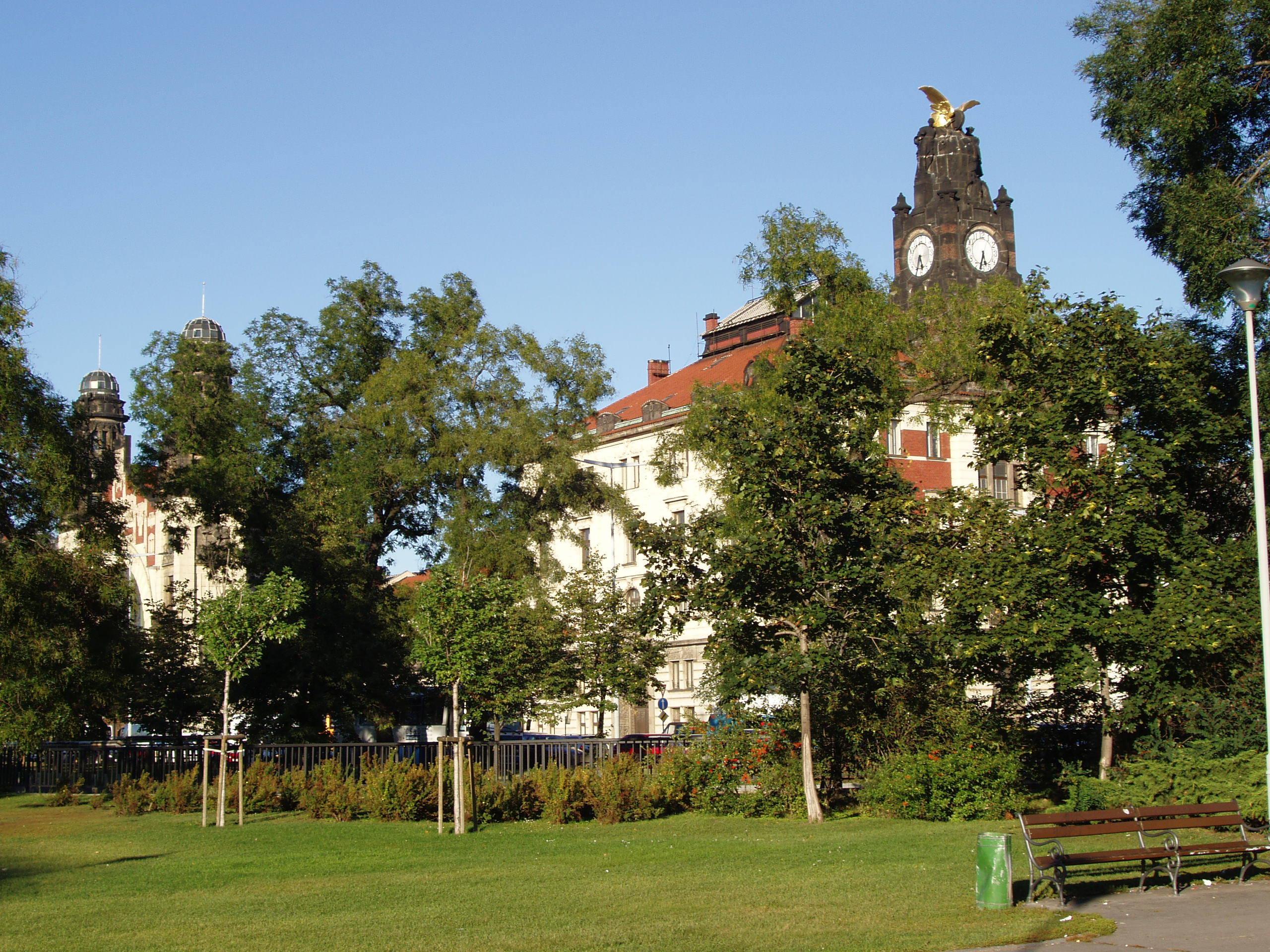 Praha hl.n. (Main Staition)